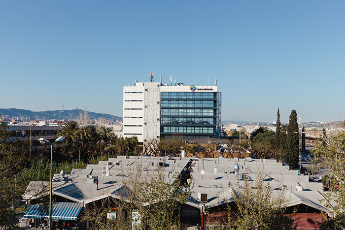 Centro directivo de Mercabarna